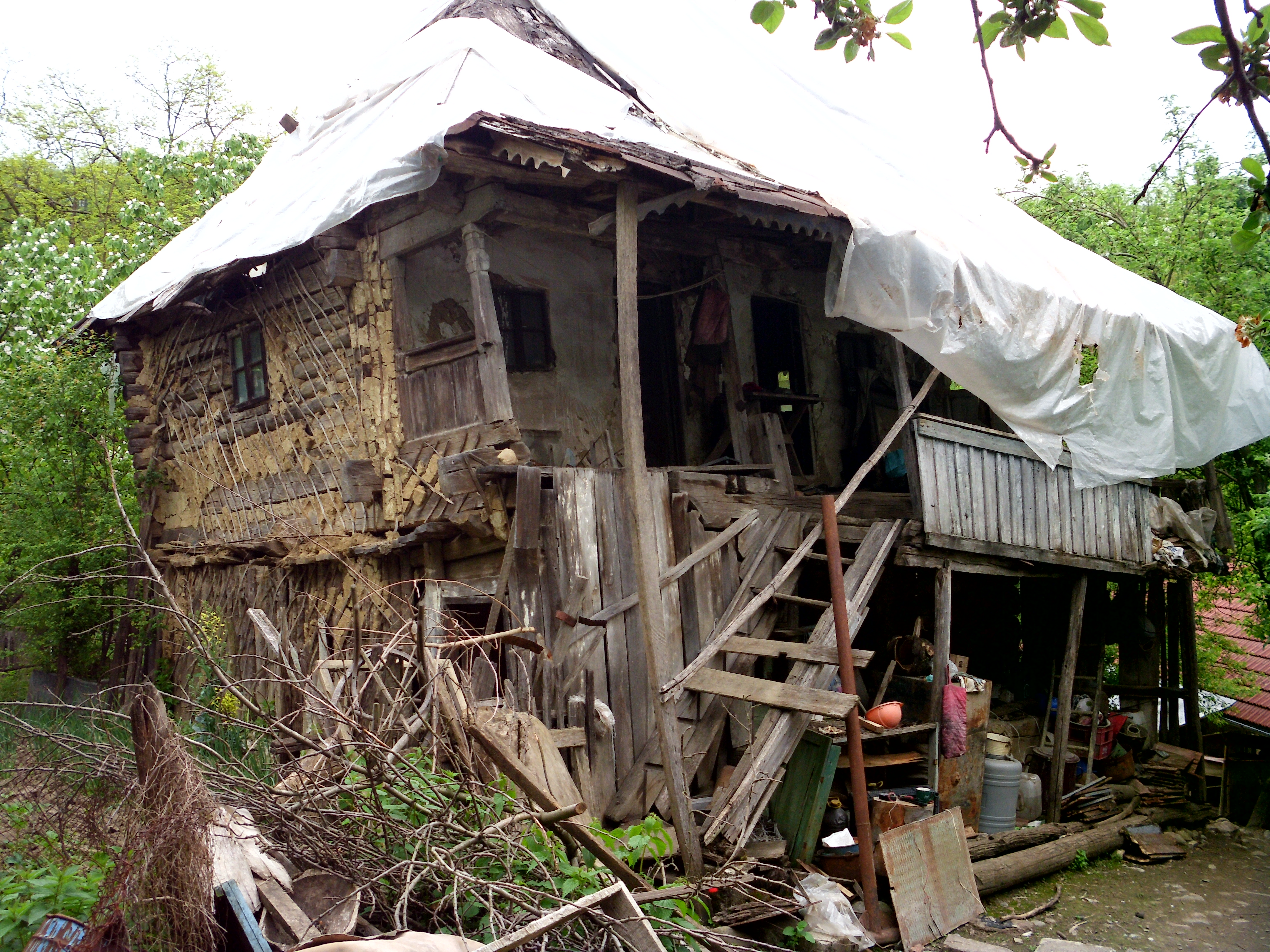 Casa de lemn Florian